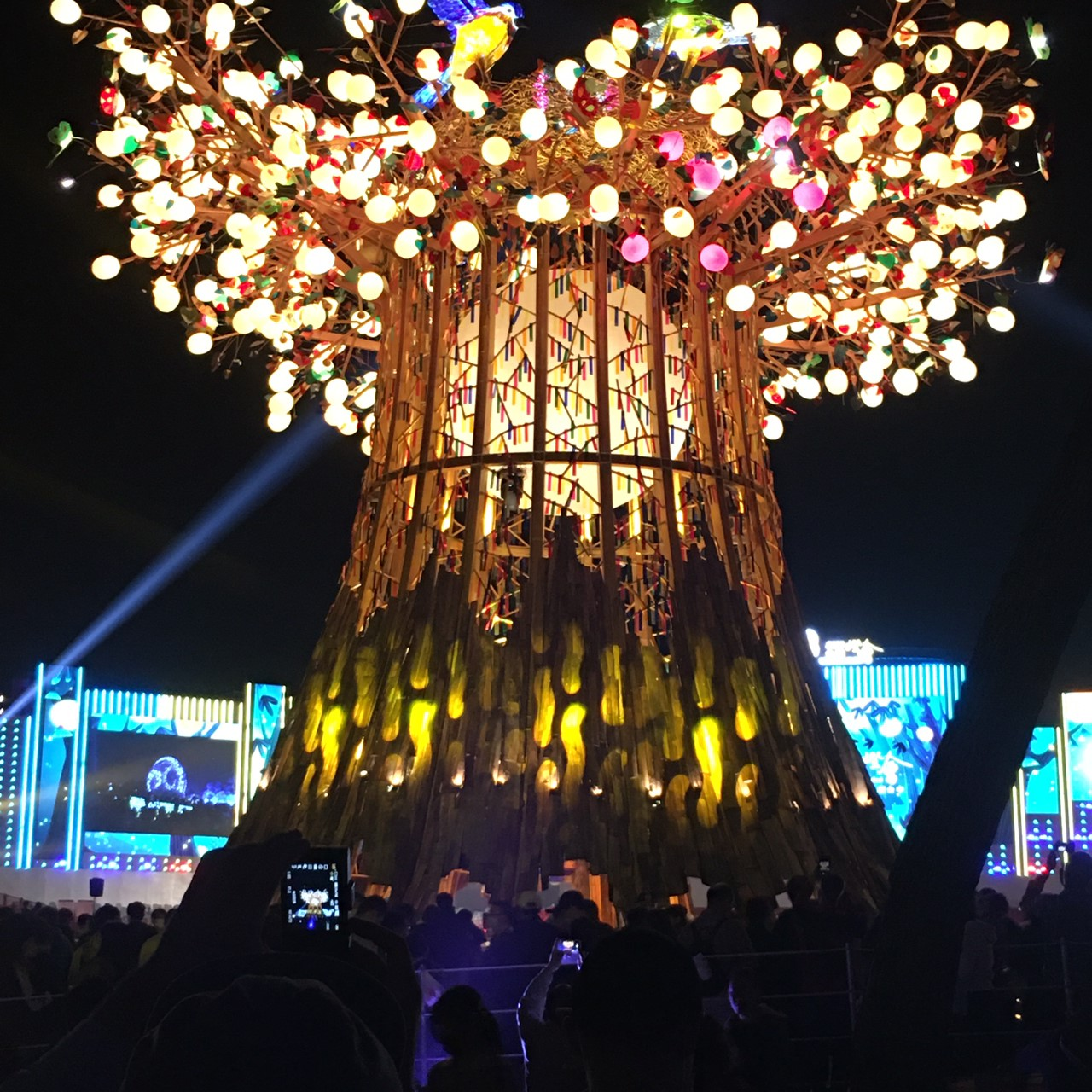 2020台灣燈會主燈-森生守護-光之樹 This photo has been taken in the country: Taiwan